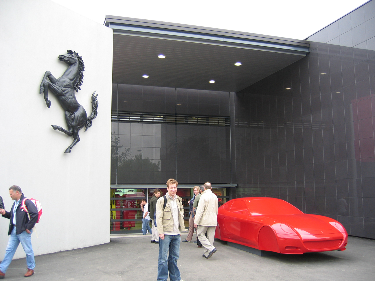 Galleria Ferrari, Maranello, Italy